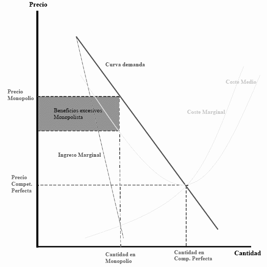 Comportamiento de precios en monopolio y competencia perfecta